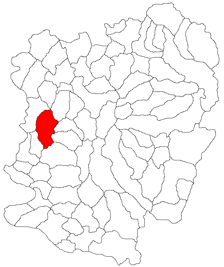 Categorie:Hărţi ale judeţului Caraş-Severin